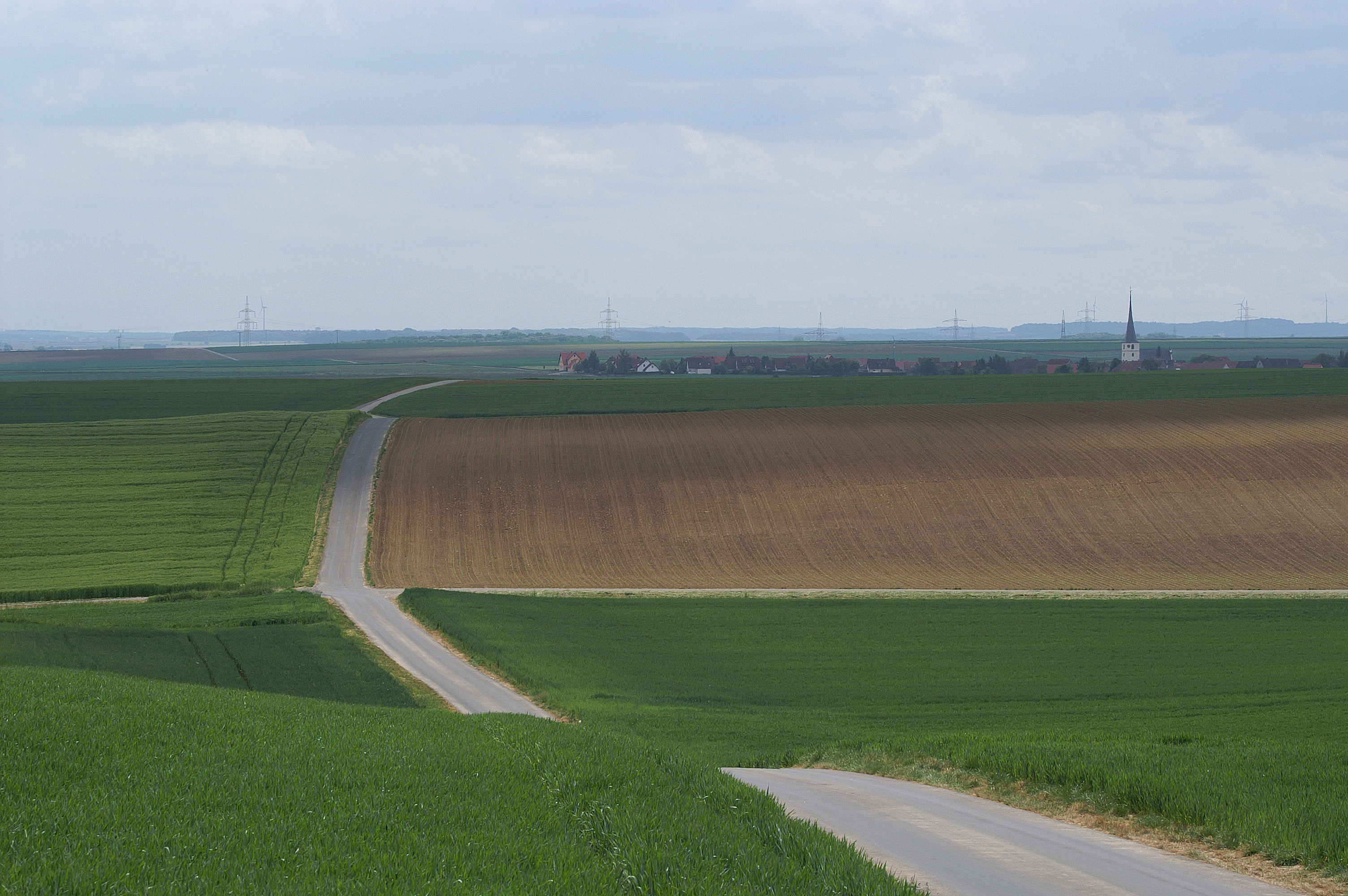 Wolkshausen von Norden, Gaukönigshofen